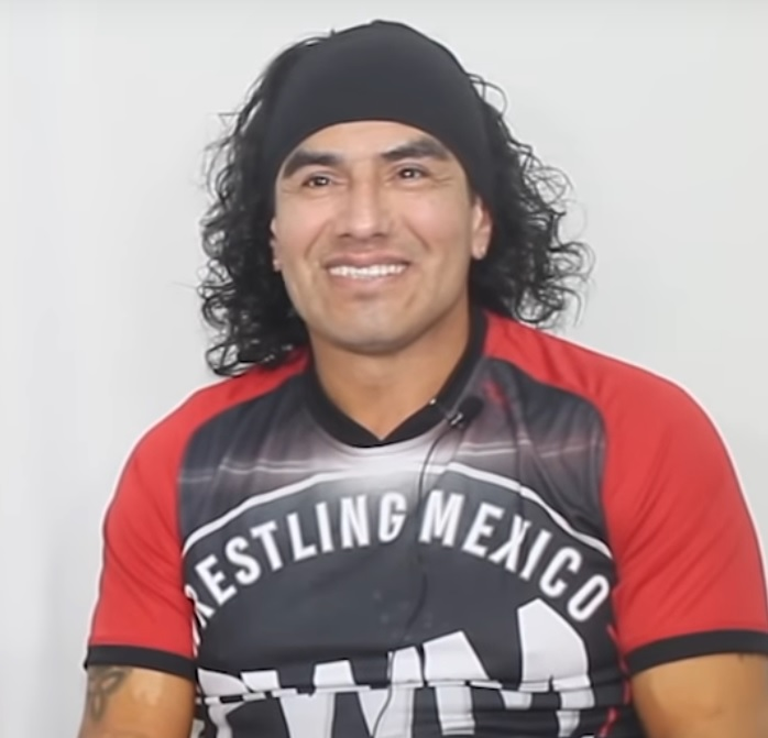 Le catcheur mexicain Psicosis en 2019.